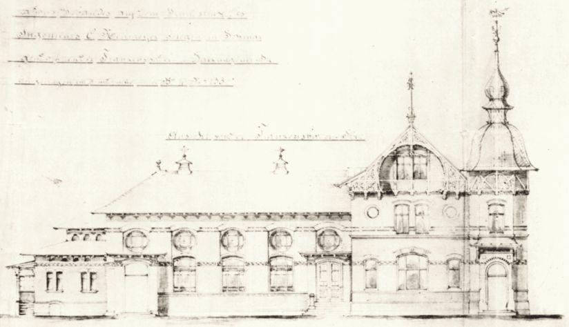 Berlin, Entwurfszeichnung Franzensbader Garten, Franzensbader Straße, Berlin-Schmargendorf